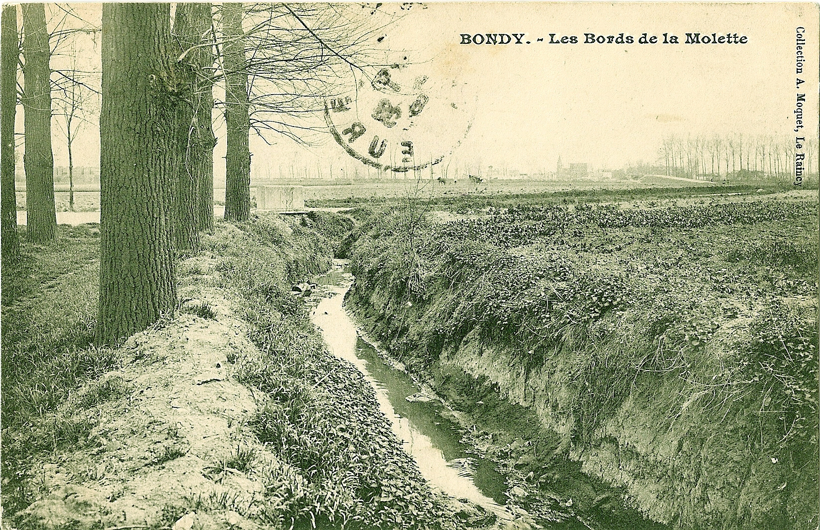 Carte postale ancienne éditée par Moquet BONDY - Les bords de la Molette